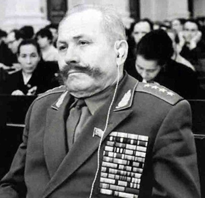 Сергей Матвеевич Штеменко (1907 — 1976) — советский военачальник, генерал армии. На сессии Верховного Совета РСФСР. Первая половина 1970-х гг.